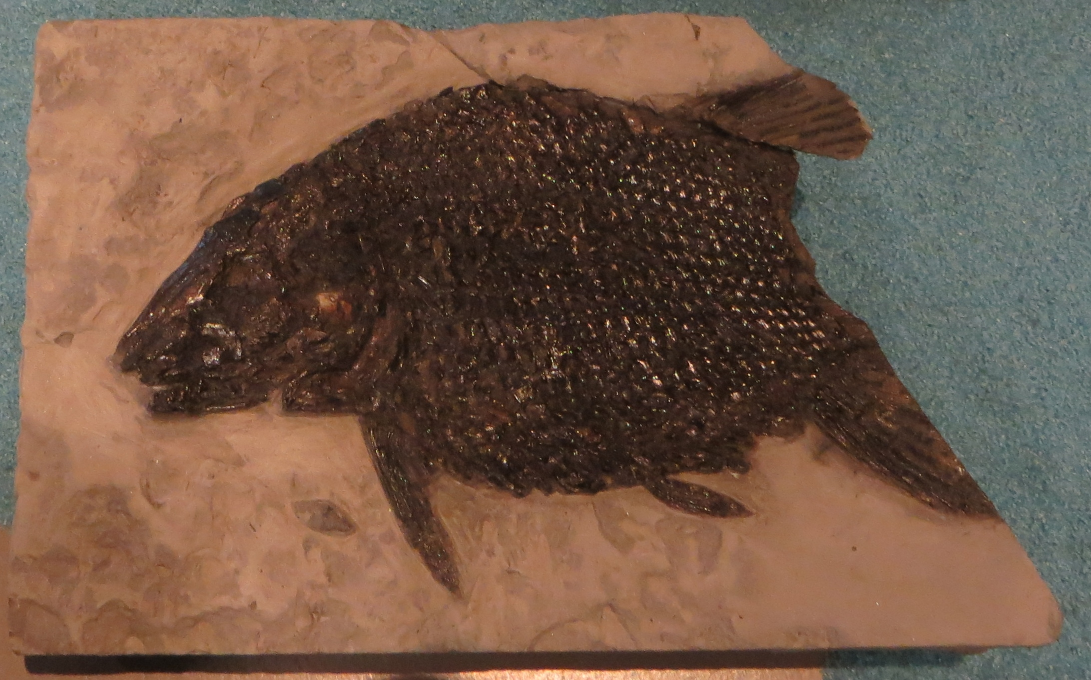 Fossil - Took The picture at Royal Belgian Institute of Natural Sciences, Brussels